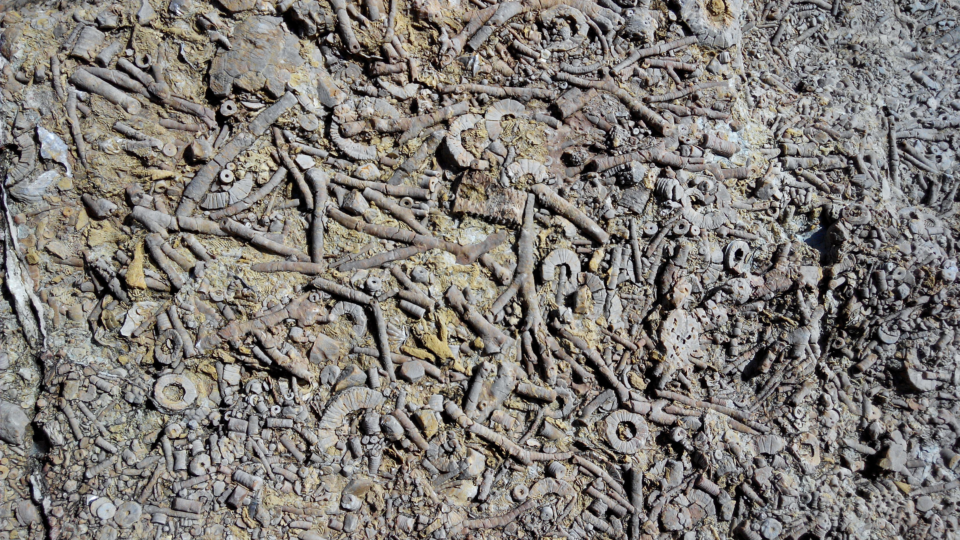 Arrecife de Arnao, Castrillón, Asturias. Fósiles